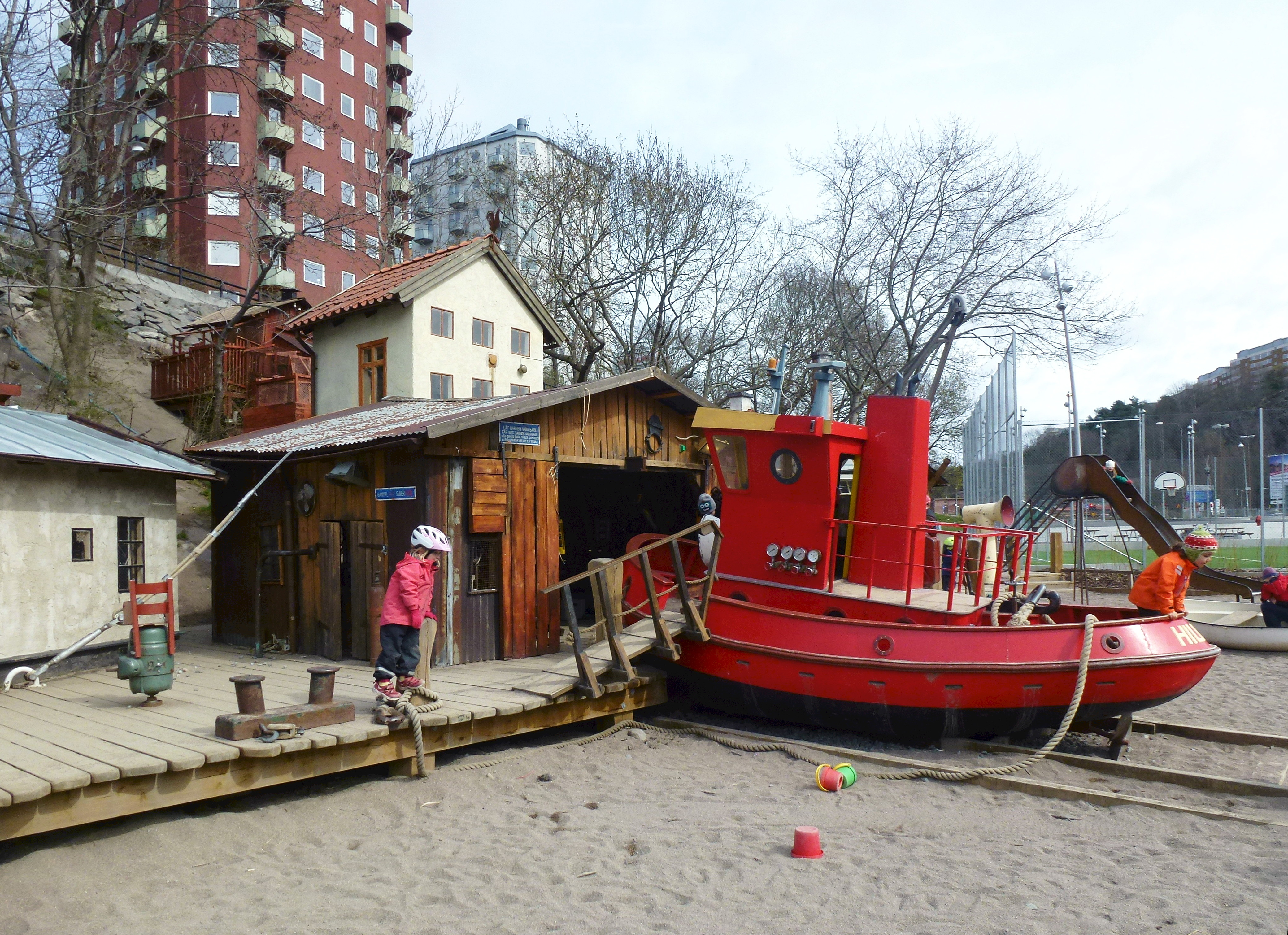 Anders Franzéns park vid Henriksdalshamnen nominerades till "Årets Stockholmsbyggnad 2015"